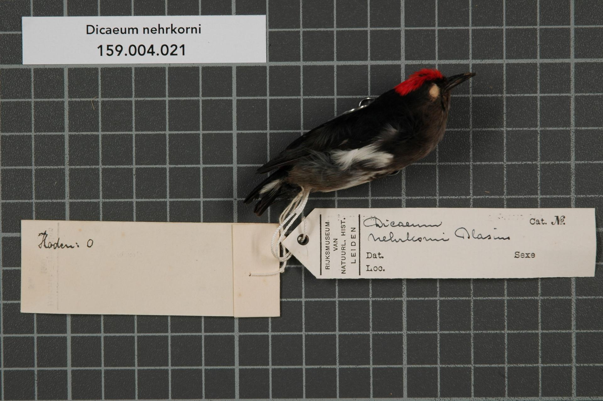 Dicaeum nehrkorni A.W.H. Blasius, 1886